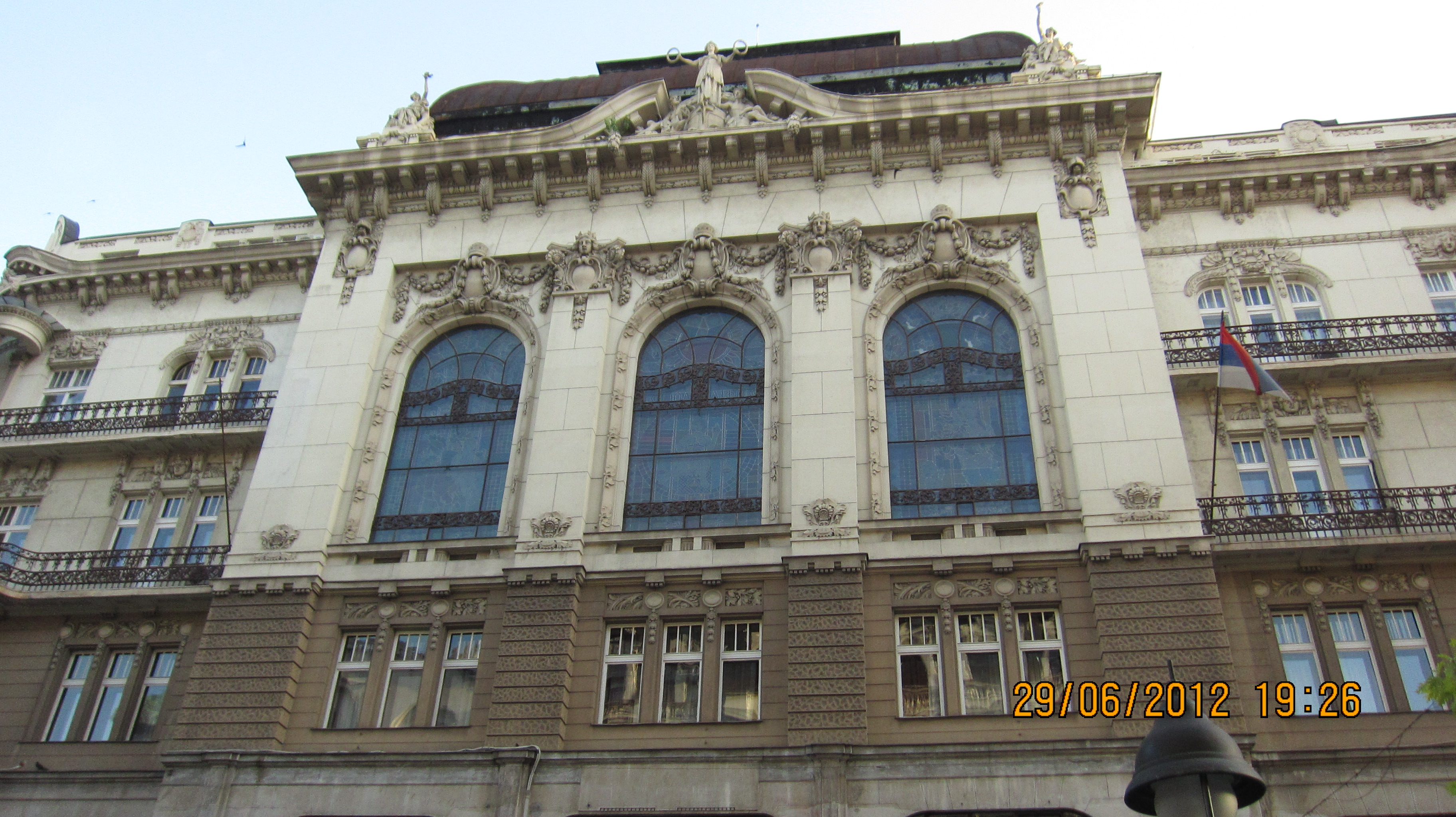 Zgrada je podignuta 1923-24 a po planovima iz 1912 god. rad Djordjevica i Stevanovica. Gradjena je u stilu akademizma sa elementima secesije